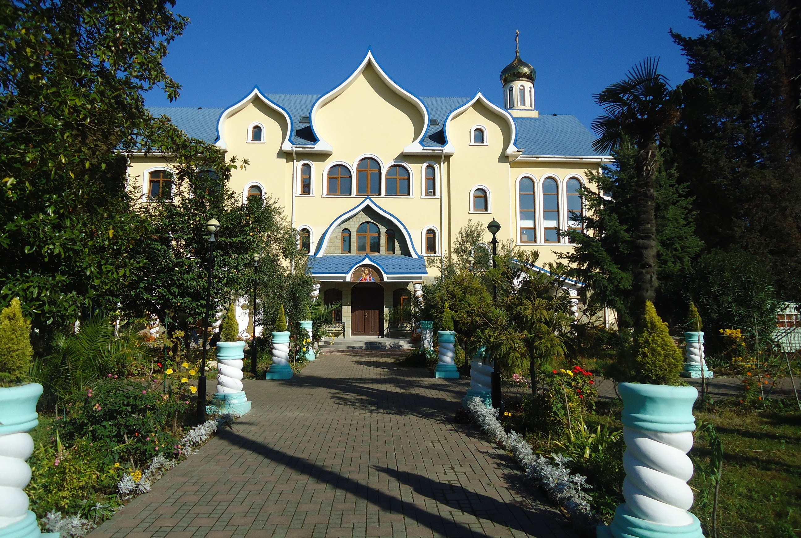 Церковь Святого Духа в Адлере